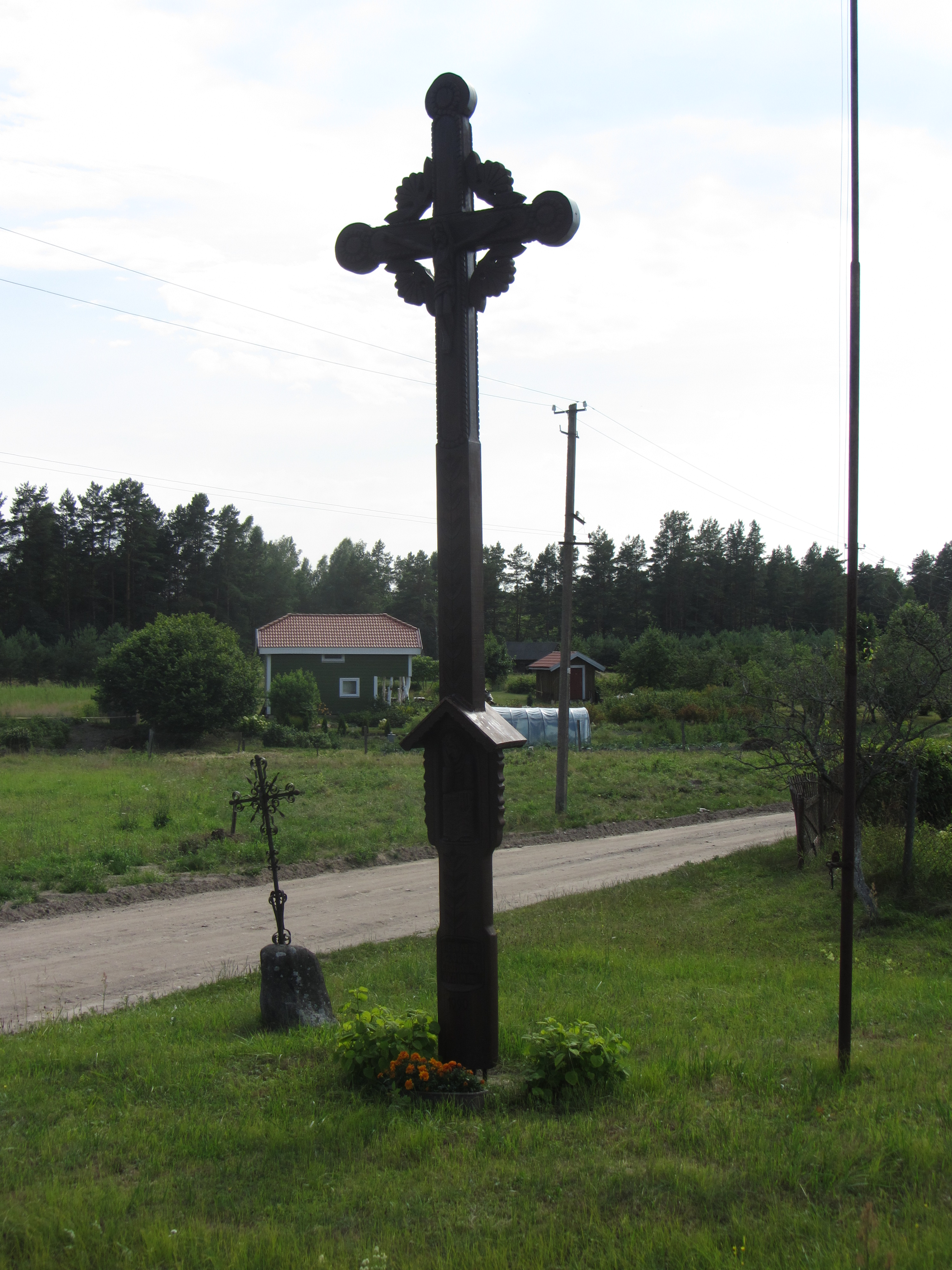 Lipliūnai, Lithuania